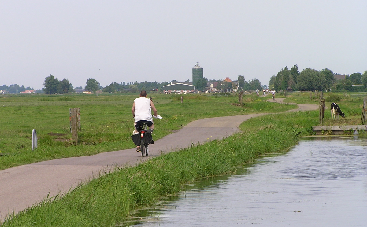 Kenmerkend voor Waterland zijn de geringe hoogteverschillen tussen land en water.